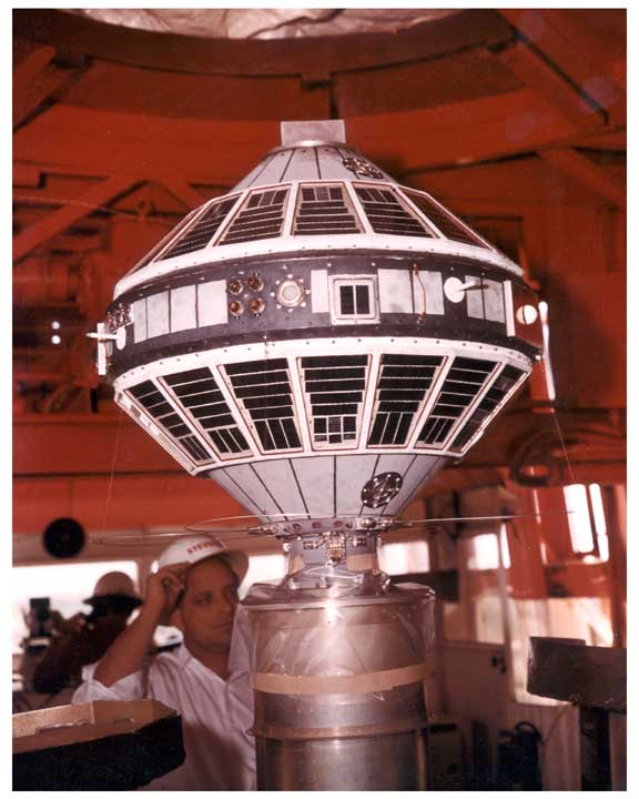 Die amerikanische Raumsonde Explorer 7